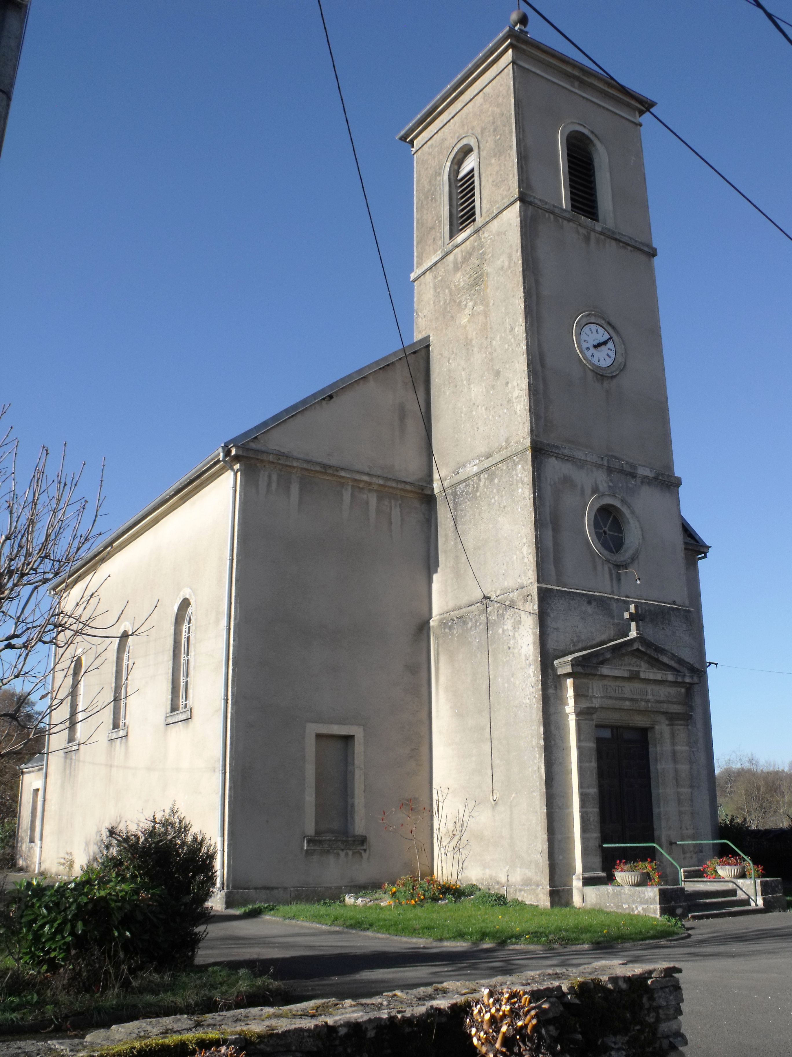 Mairie de Geney, Doubs, France